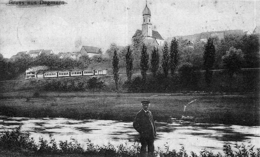 Ansicht von Degmarn und eingezeichneter Bahn, Postkarte gelaufen 1908.